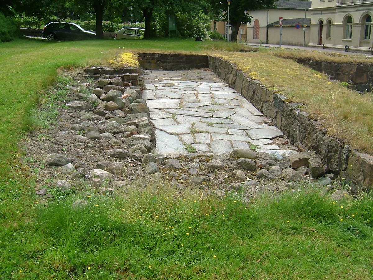 Håkon Håkonssons kongsgård i Tønsberg. Fundamenter i nordøstre rom.